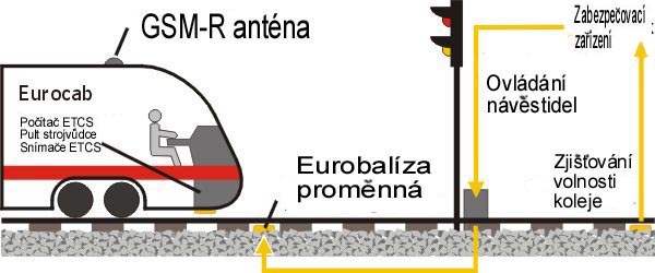 Princip funkce ETCS L1. Z německé wikipedie, upravil PetrS. Zeichnung erstellt 10/2003 von Benutzer:Sansculotte. Bild ist unter der GNU FDL zur weiteren Verwendung freigegeben. Quellenangabe und Beleg an erbeten.